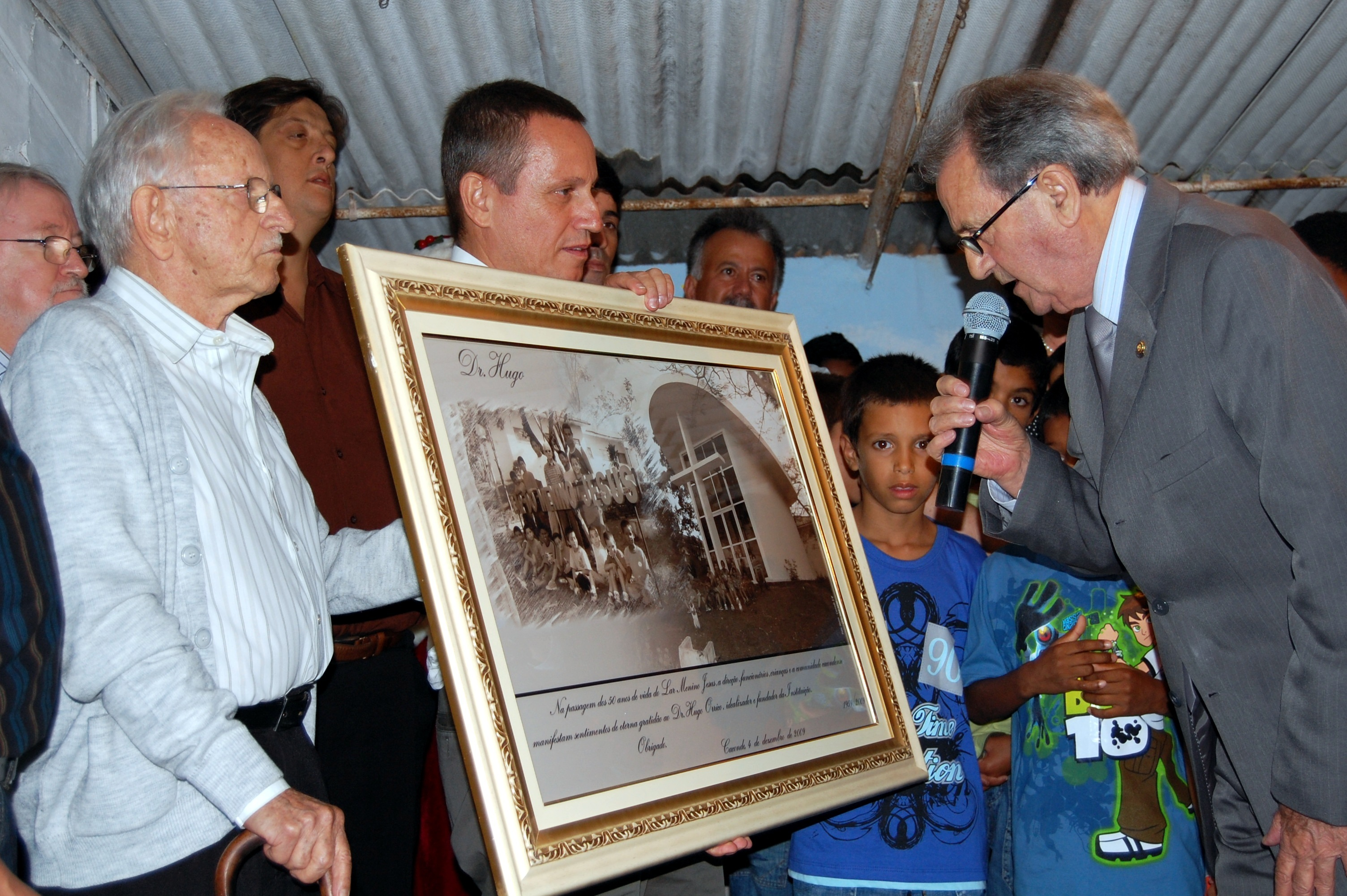 Foto por Luiz Orrico - cedida para domínio público